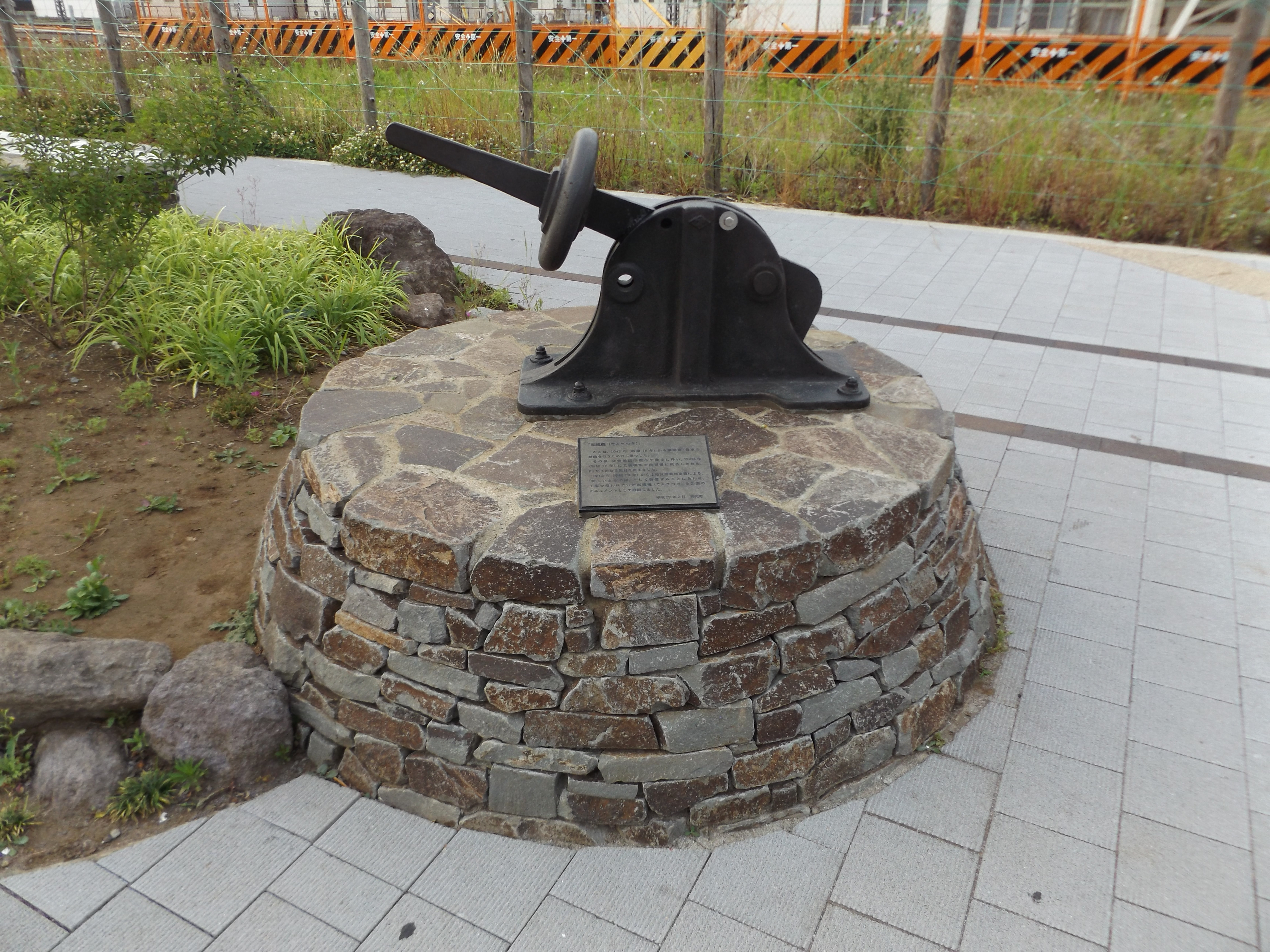 埼玉県南埼玉郡宮代町の東武鉄道伊勢崎線（東武スカイツリーライン）・日光線東武動物公園駅西口にある転轍機のモニュメント。 かつて東武動物公園駅に隣接して東武鉄道の杉戸工場があり、機関車や貨車の整備を行っていたが、同工場の機能を南栗橋に統合したため2004年に廃止された。 この転轍機は杉戸工場で使われていたもので、西口の整備に合わせてモニュメントとして設置された。